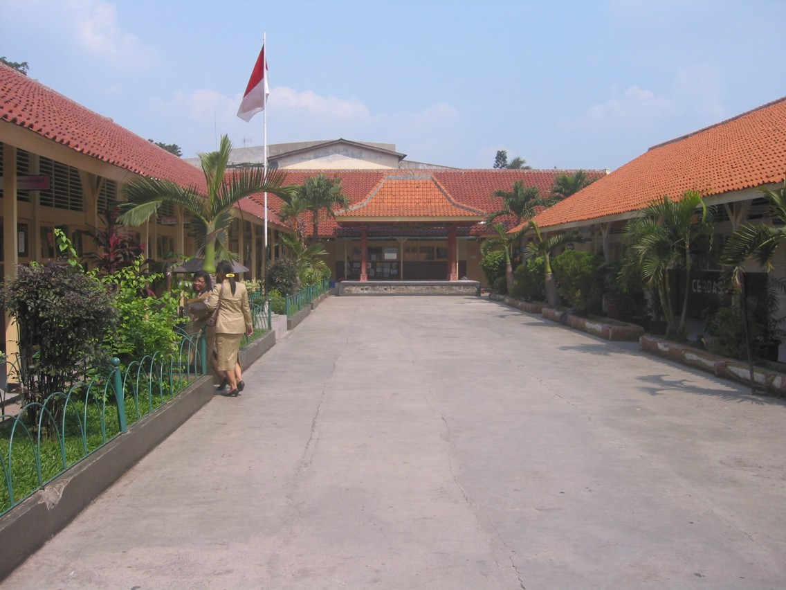 SDN Pondok Labu 01 Pg